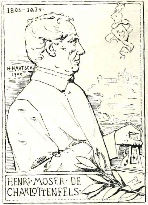 "M. Henri Moser."